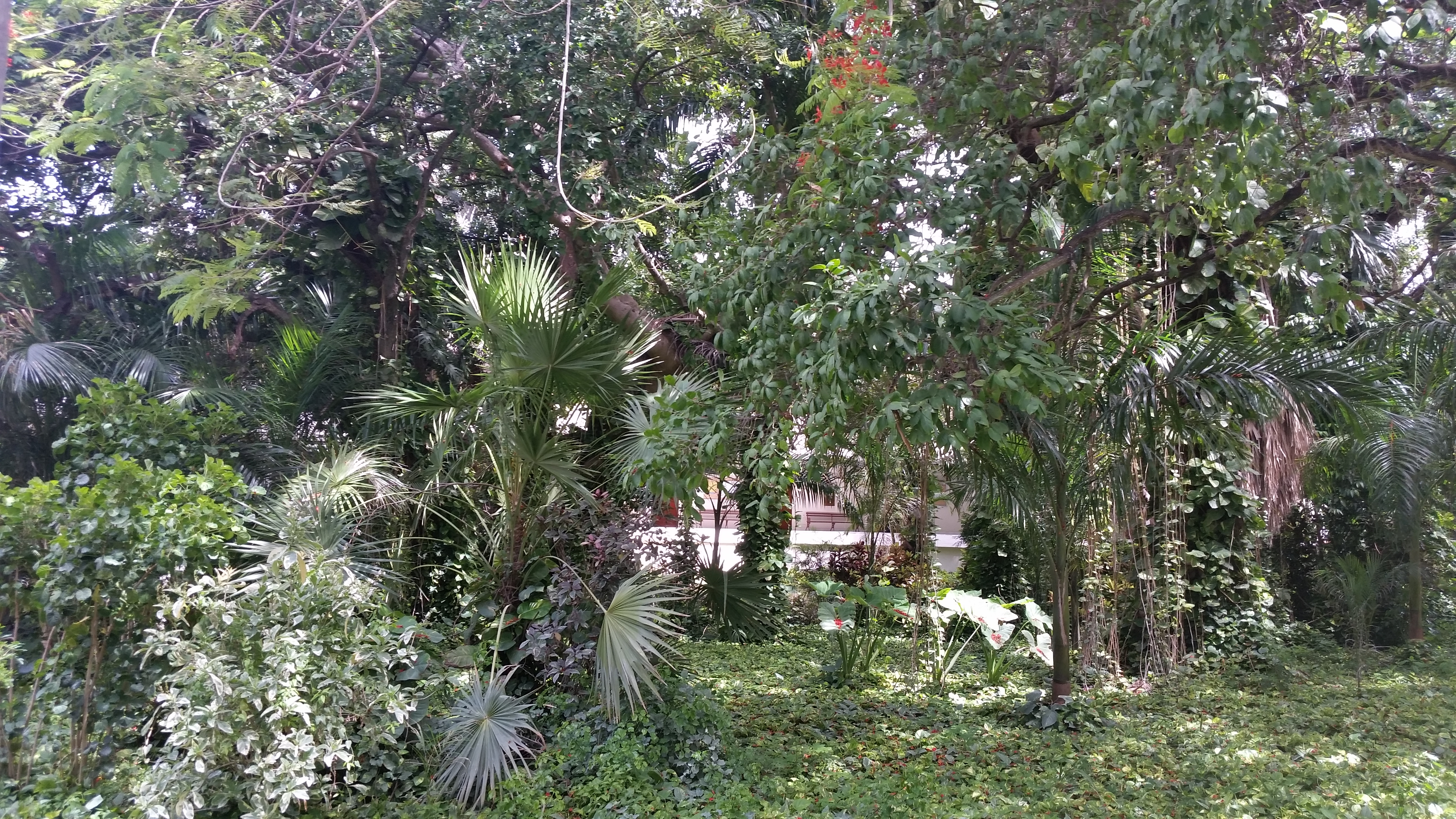 fac de administracion